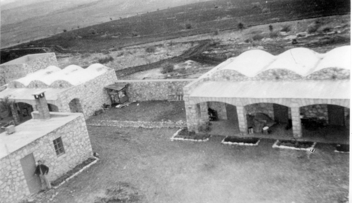 פלוגה ד התל-אביבית 1947-1941 - ההאחזות בחוקוק - במצודה היו חדרי מגורים, מגדל תצפית ומאפיה, וכן מקלחות וחדר נשק של הנוטרים. מודל כזה נבנה גם בביריה, ובקדש נפתלי